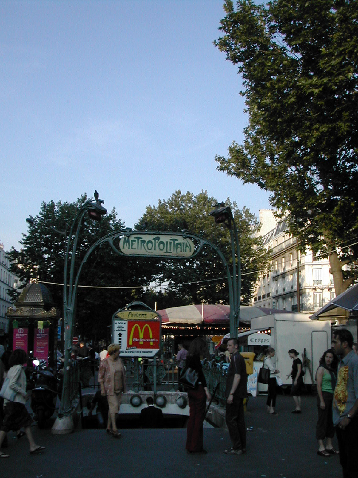 Paris metro station entrance